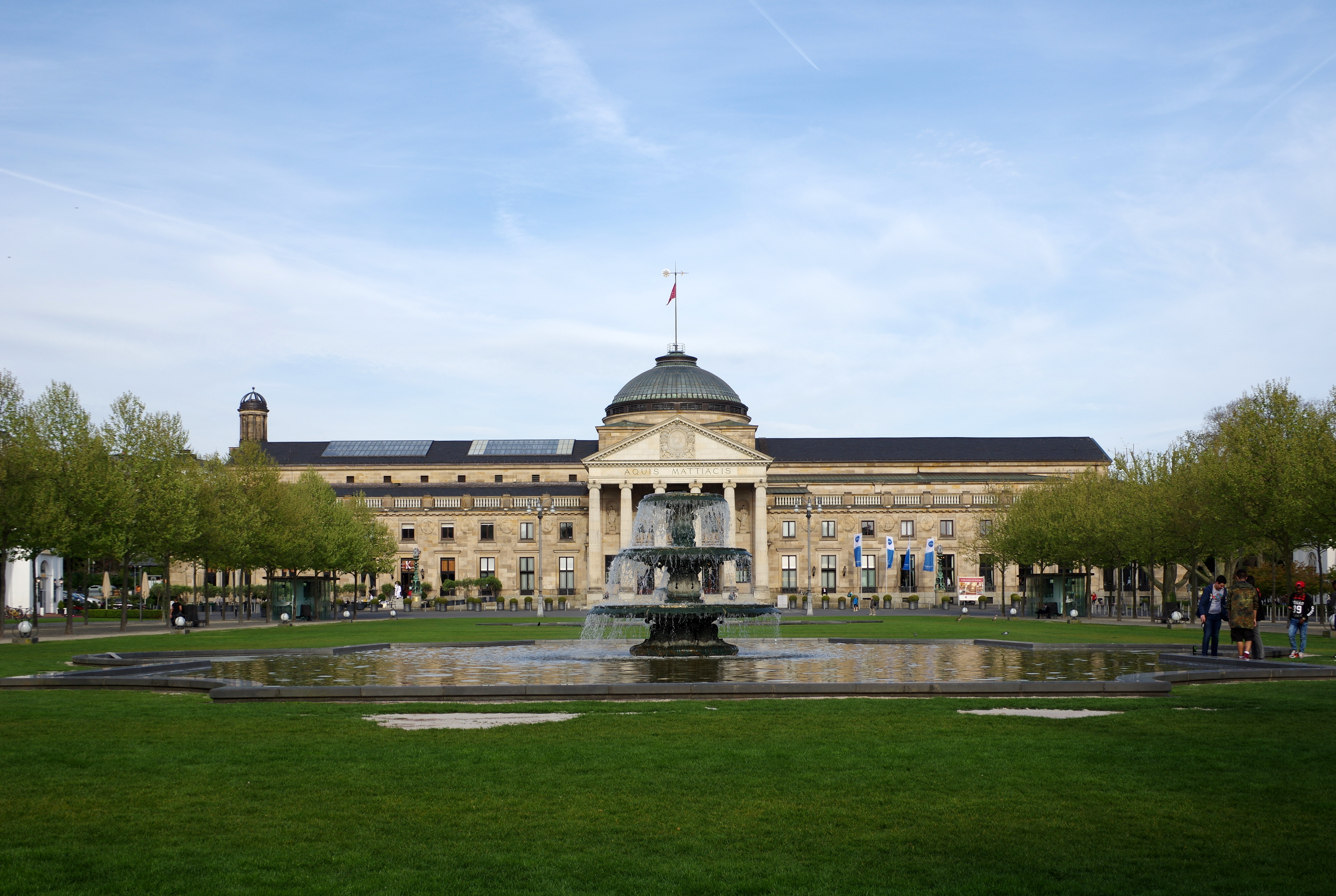 Deutschland, Wiesbaden, Kurhaus